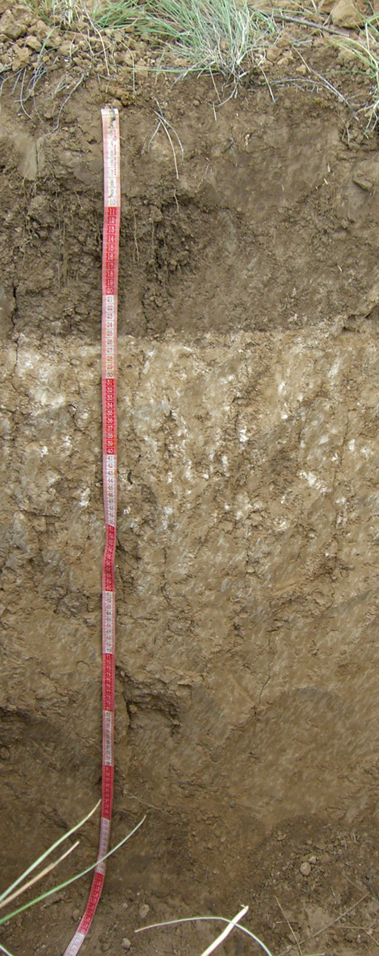 Профиль каштановой карбонатной пахотной почвы (Petrocalcic kastanozem), Иловлинский р-н, Волгоградская область, Россия